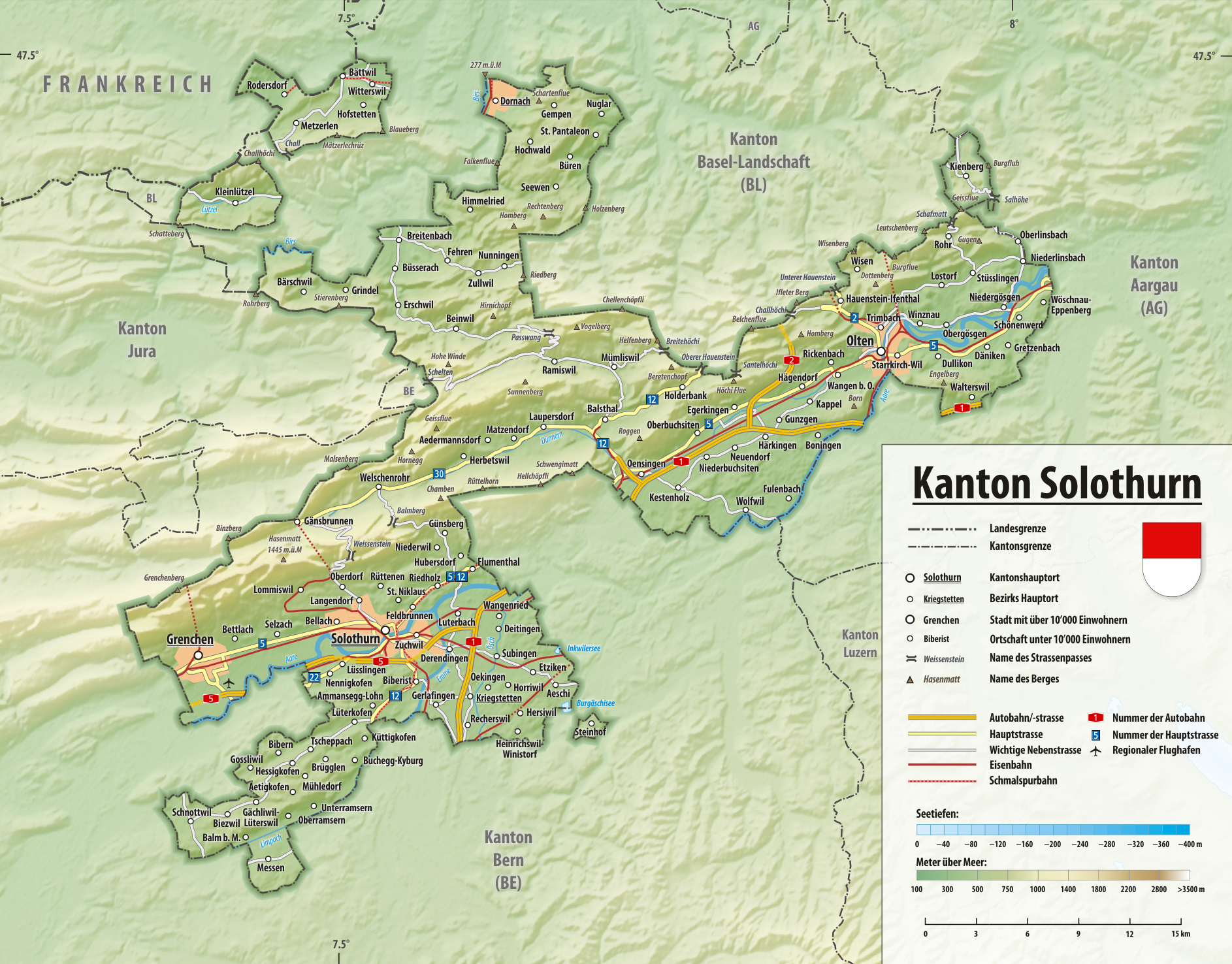 Reliefkarte des Kantons Solothurn Topographischer Hintergrund: NASA Shuttle Radar Topography Mission (public domain). SRTM3 v.2.